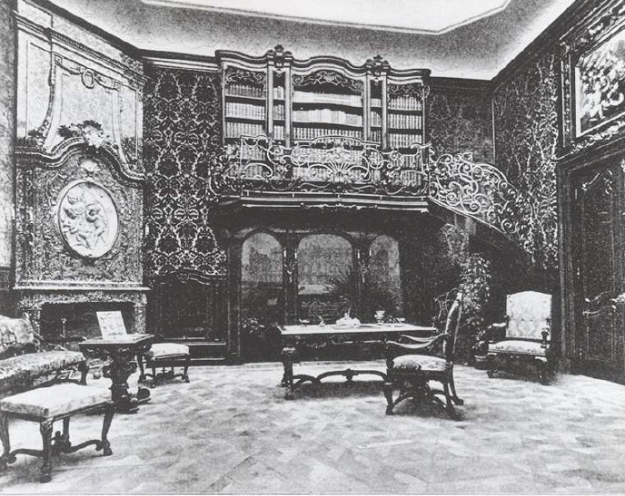 Bibliotheksraum in der Art des Wiener Barocks, gezeigt bei der Kunstgewerbeausstellung in London 1902. Gebaut von Sándor Járay sen. (1845–1916).